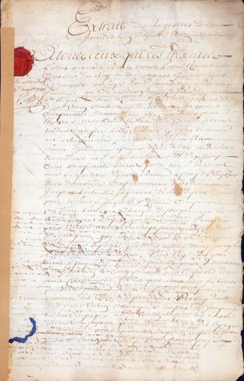 Première page sur trois d'un jugement contre Louis Lepage de Sainte-Claire en faveur de Varin, contrôleur de la marine, pour 1900 livres.